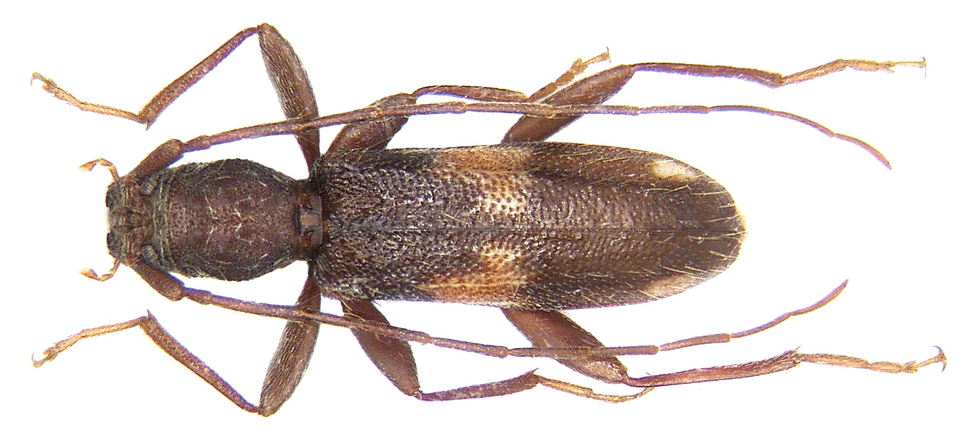 Familie: Cerambycidae Grösse: 6-15 mm Verbreitung: Südeuropa, Nordafrika Ökologie: Entwicklung meistens in Laubholz Fundort: Sardinien, Costa Rei, Monte Nai leg. U.Eitschberger; det. A.Weigel Foto: U.Schmidt, 2006